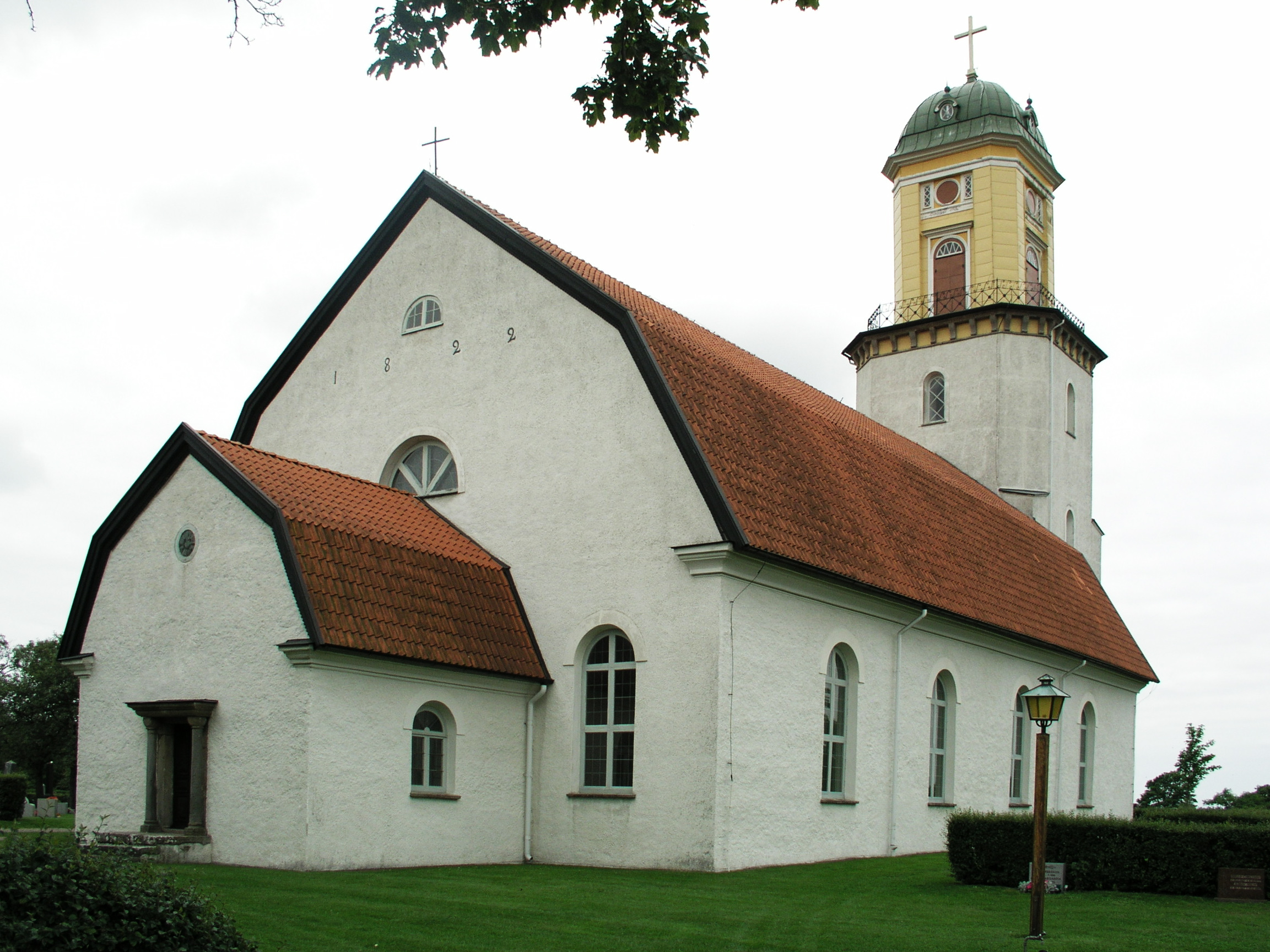 Algutsrums kyrka /church. Mörbylånga kommun, Diocese of Växjö. View.